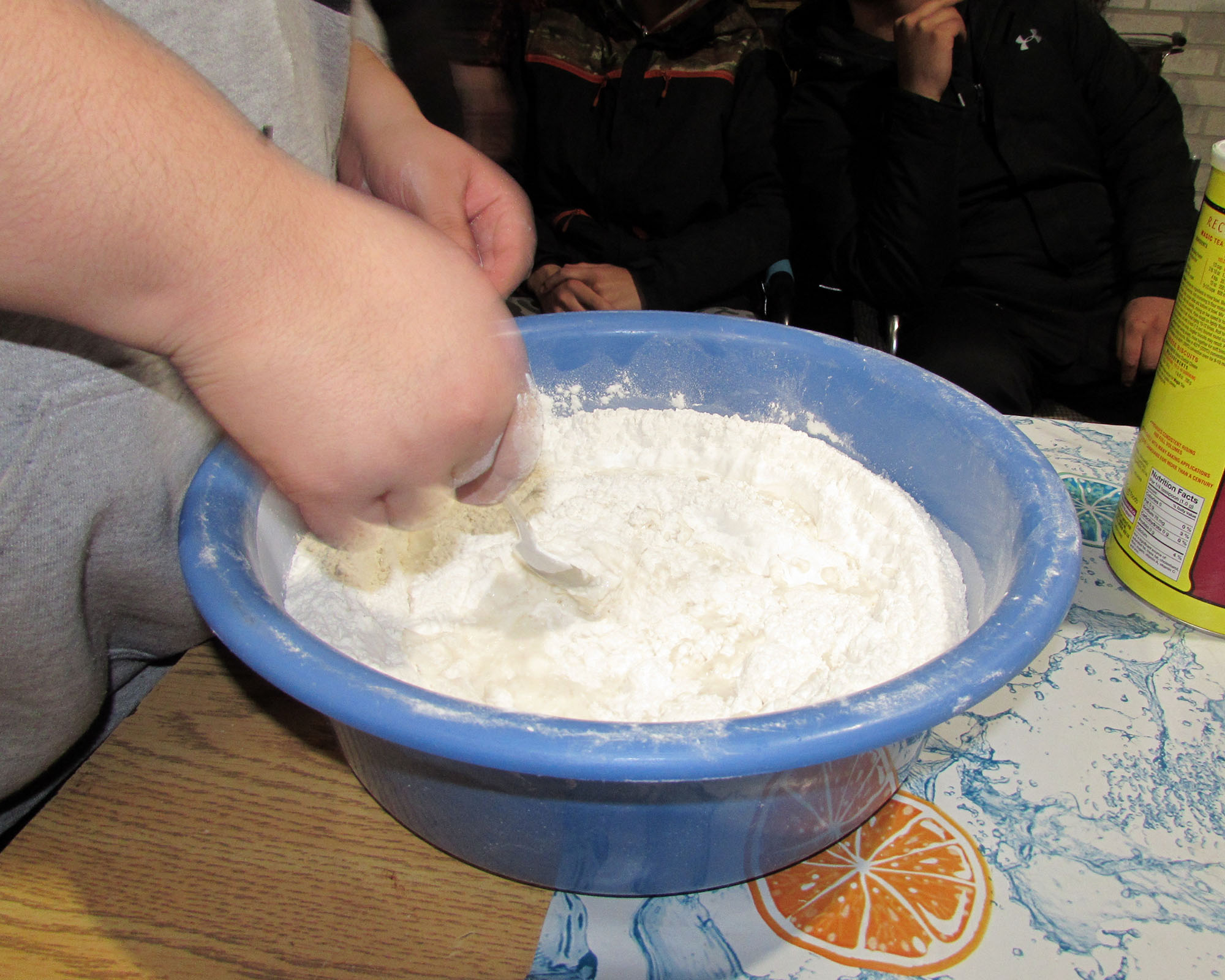 préparer la bannique